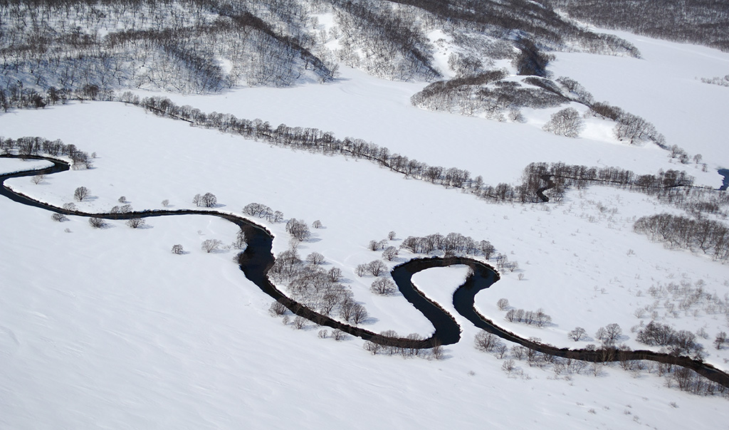 Река Тихая в Кроноцком заповеднике